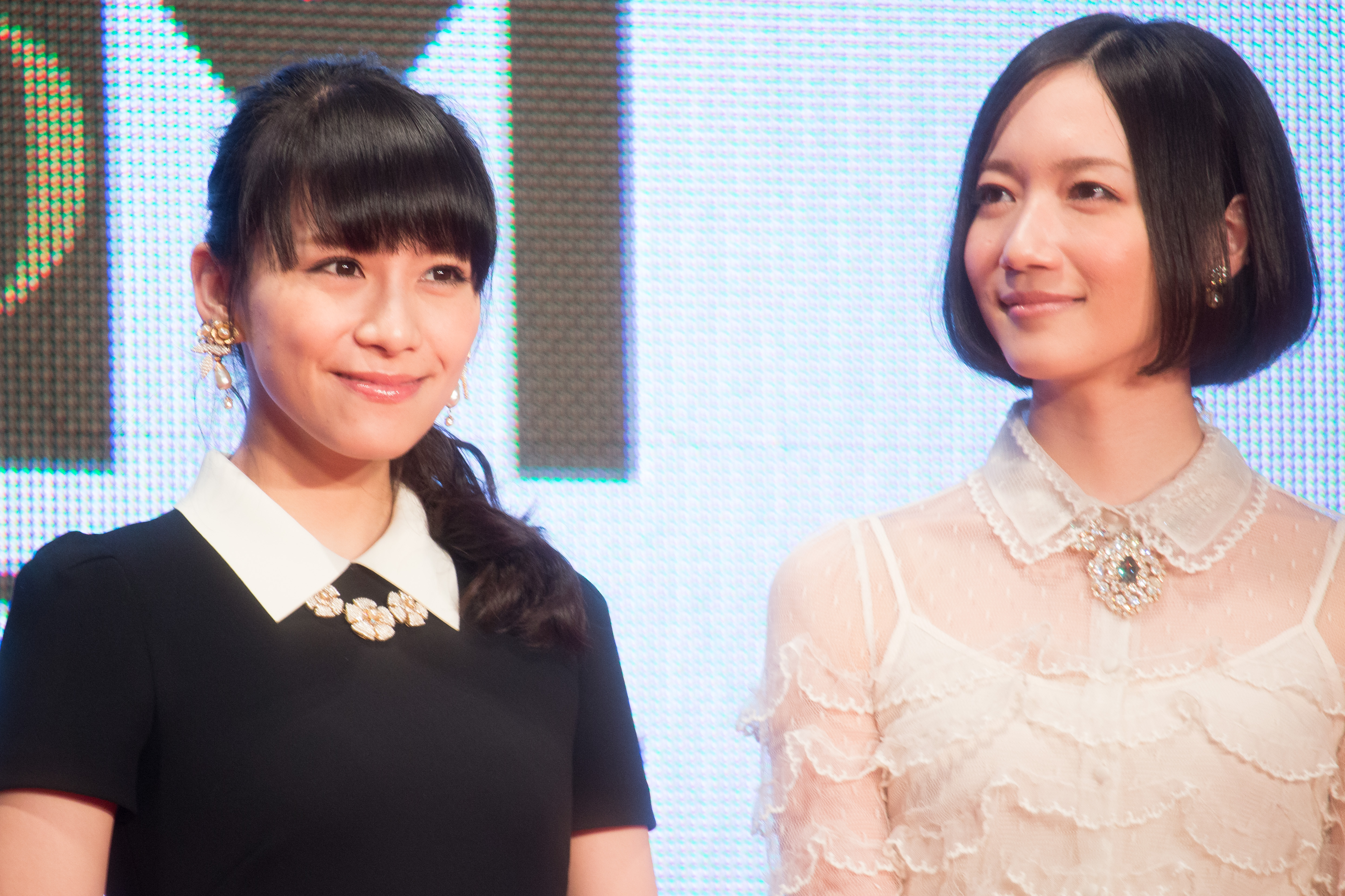 第28回 東京国際映画祭 オープニングセレモニー あ～ちゃん のっち (Perfume) (We Are Perfume)